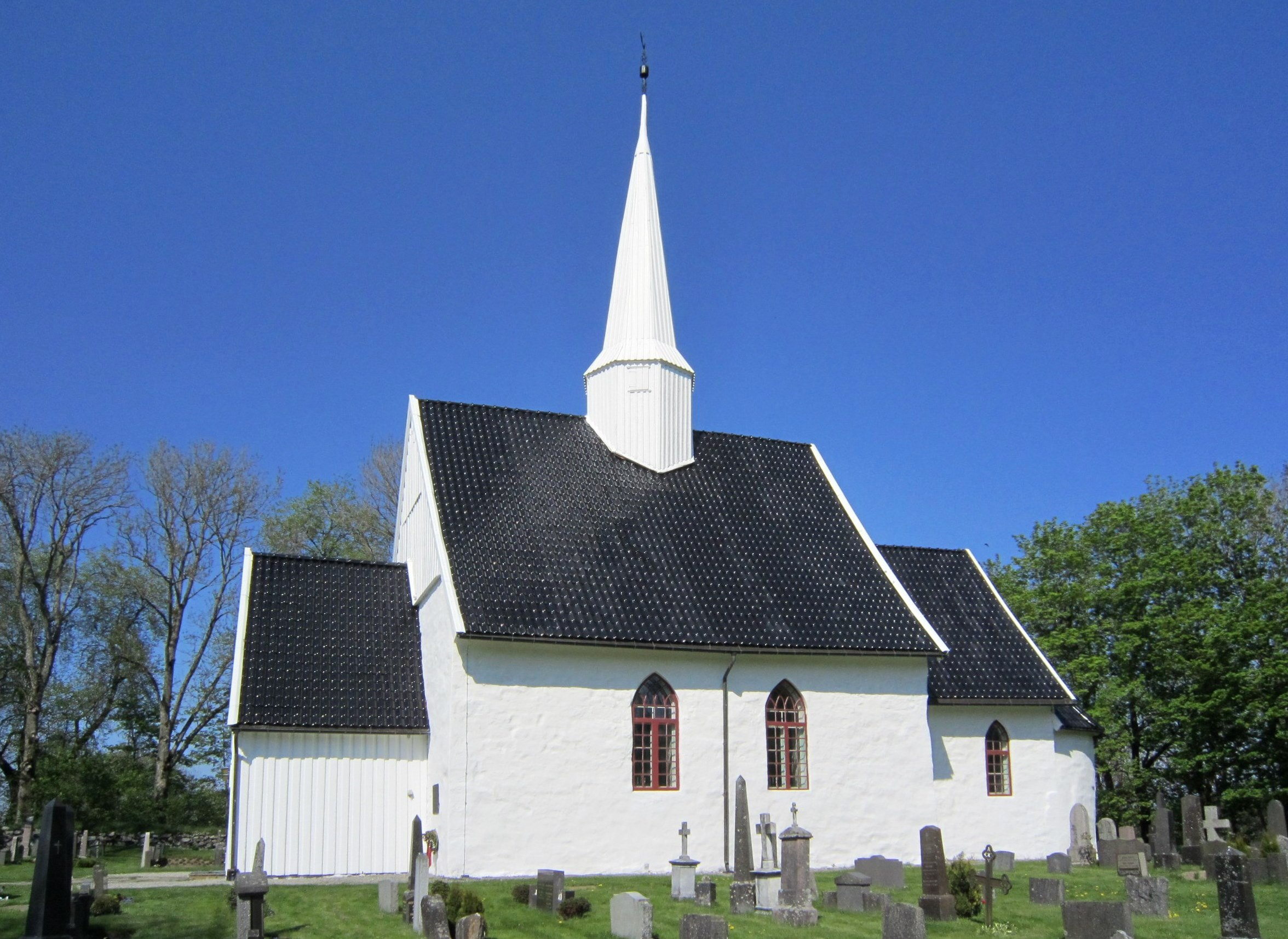 Hobøl kirke